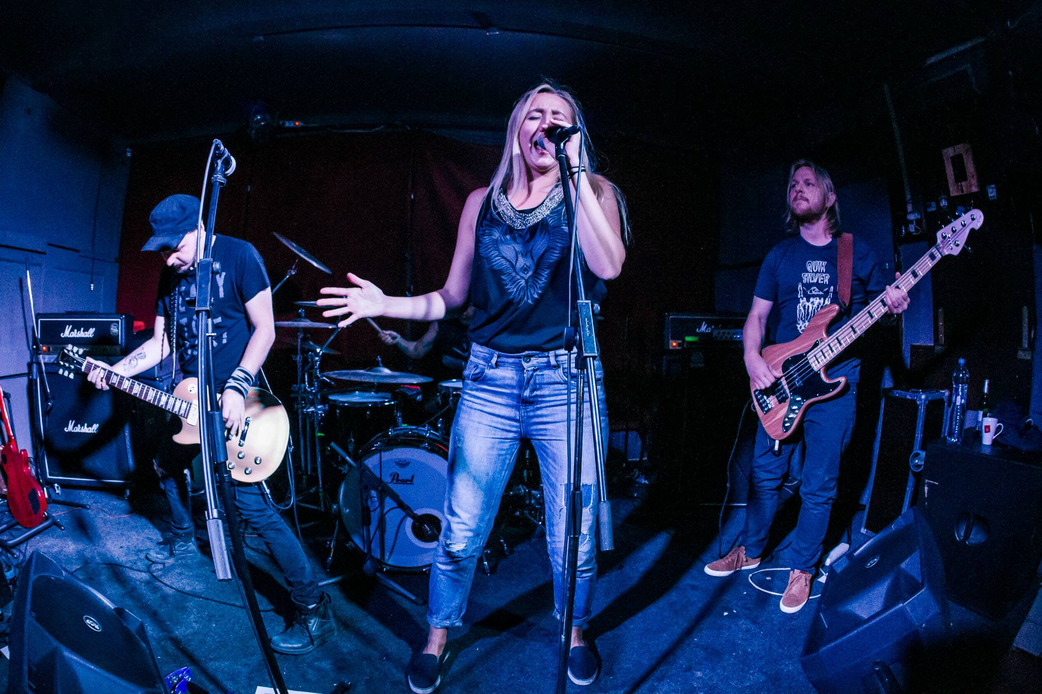 Lucky Brew ve Velbloudu v ČB